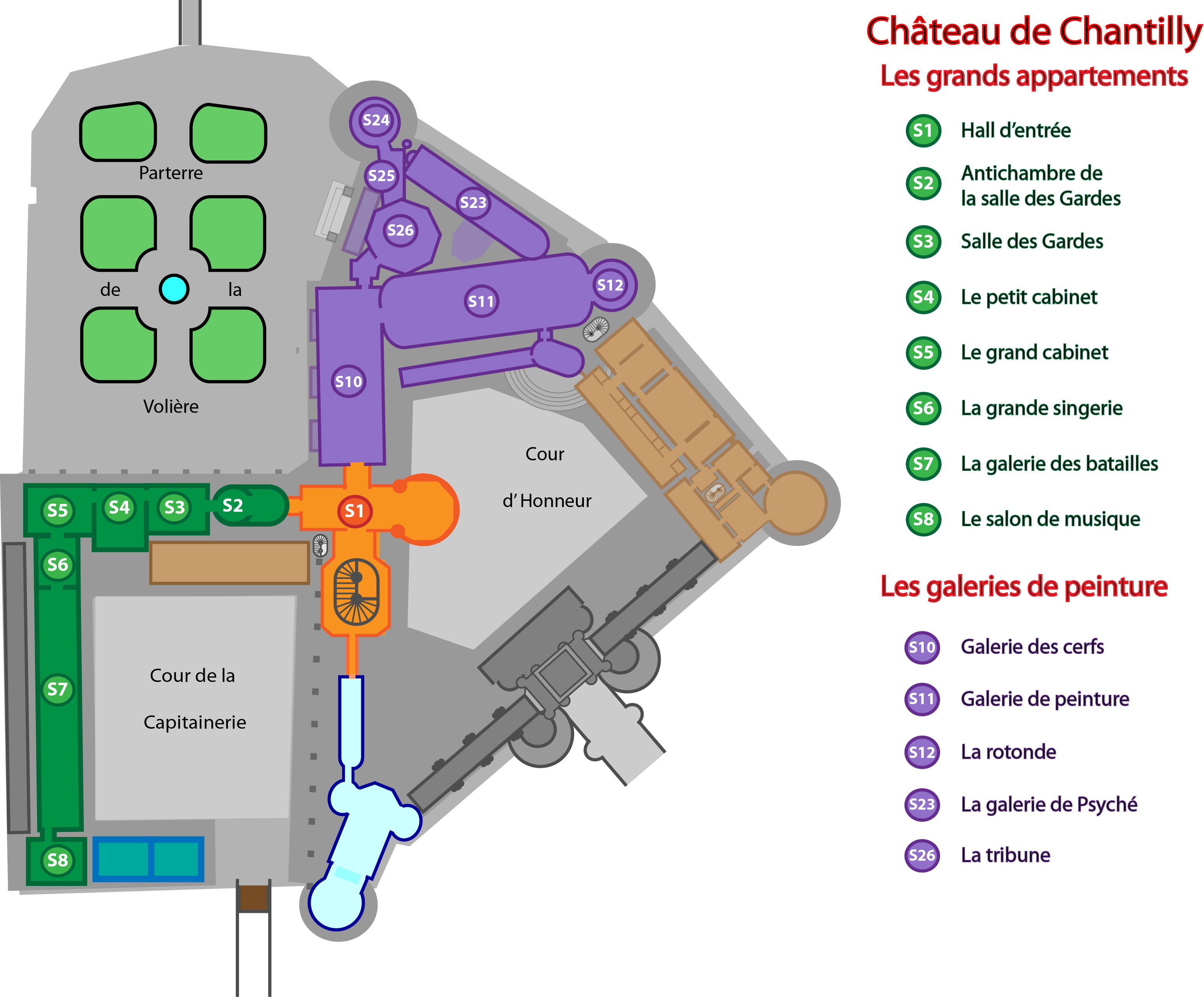 Visit Plan for Condé Museum.